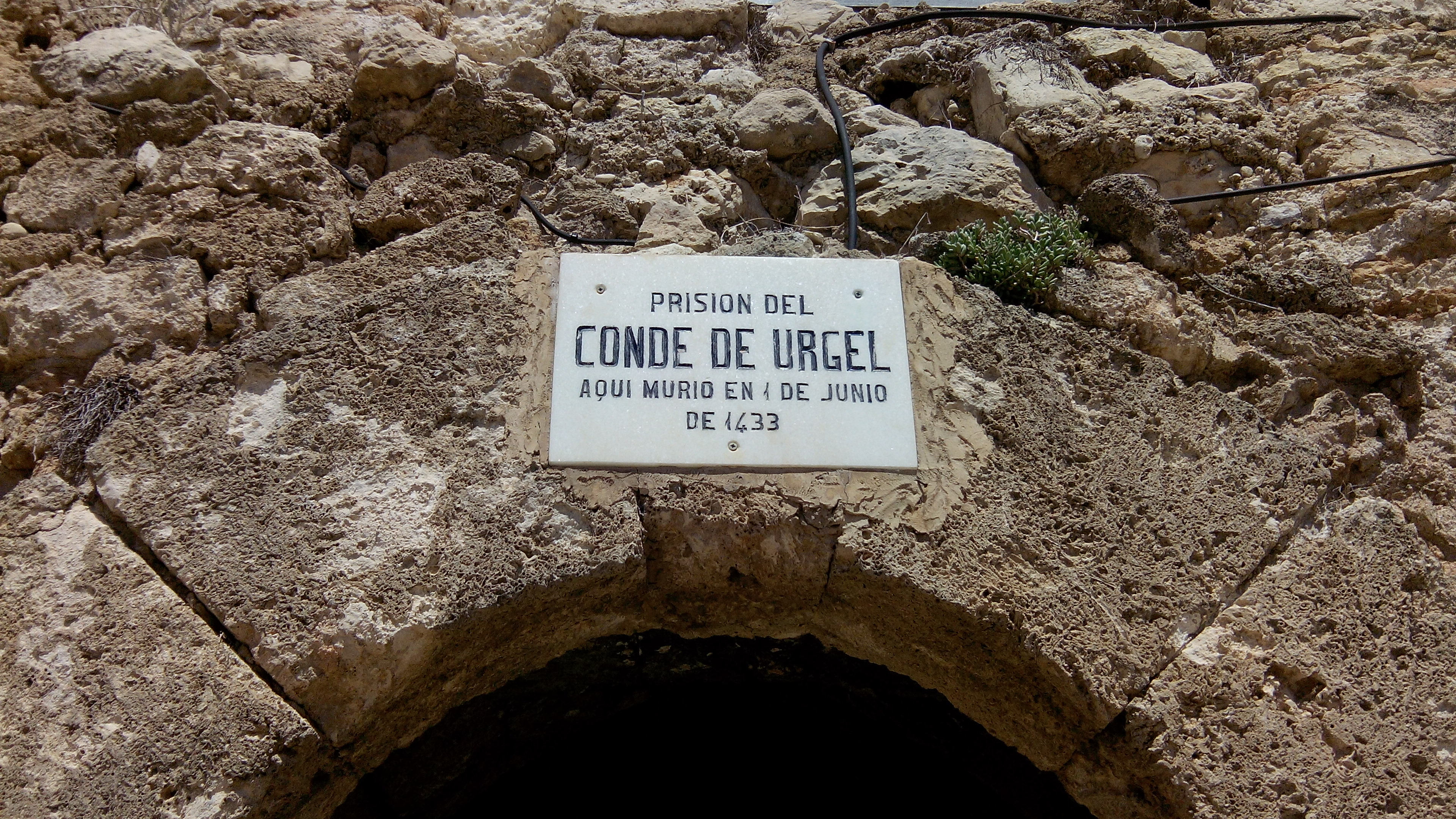 Serra del Castell de Xàtiva This is a photography of a Special Area of Conservation in Spain with the ID: ES5232009. Natura2000 entry, EEA entry